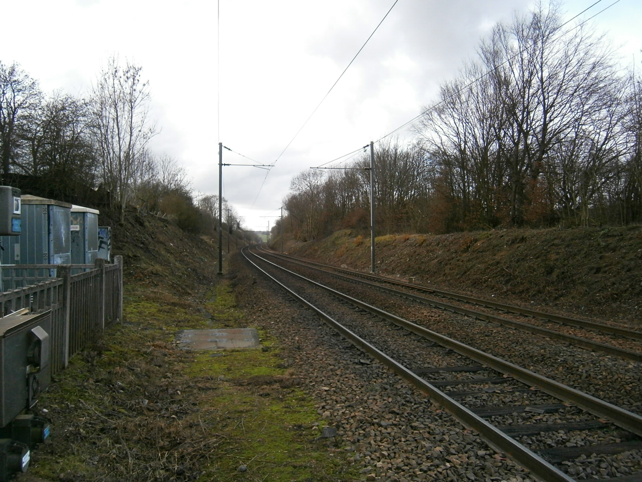 La ligne de Plaisir - Grignon à Épône - Mézières (vue en direction d'Épône - Mézières), au passage à niveau n° 1, à Saint-Germain-de-la-Grange (78).